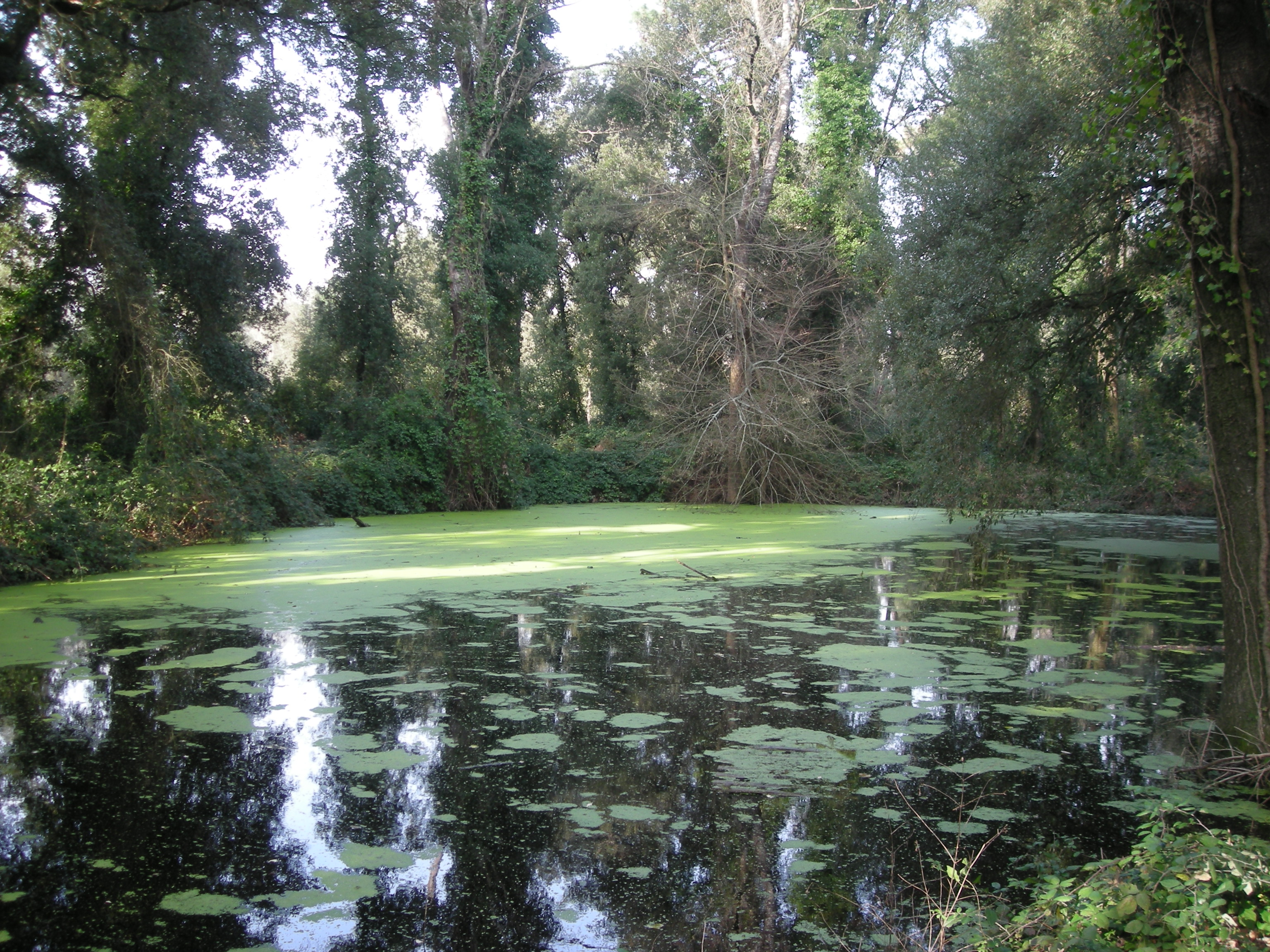 zona umida a cornacchiaia